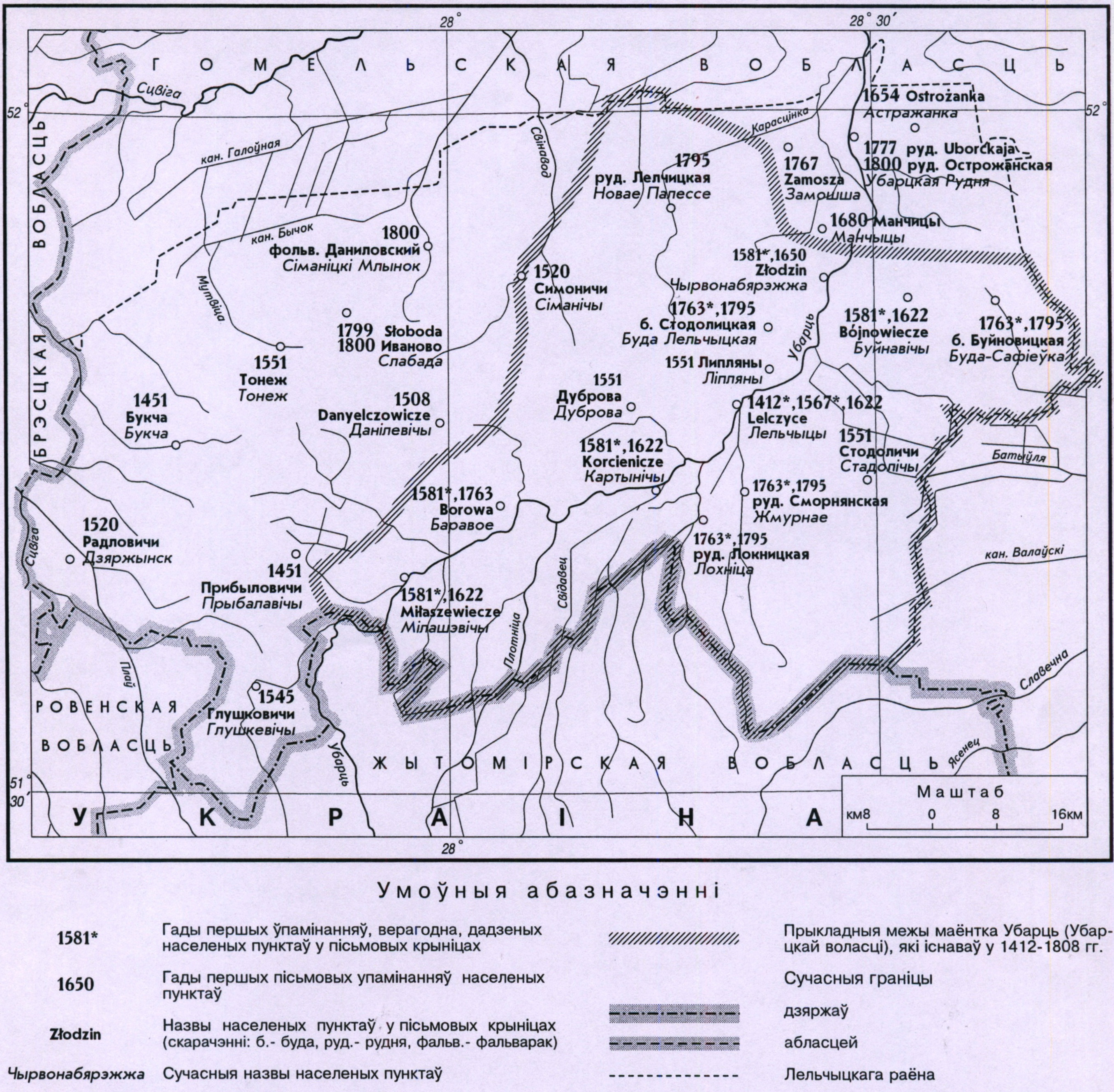 Убарцкая воласць